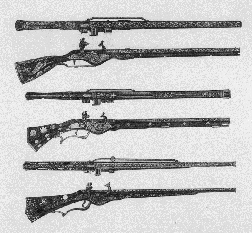 Карабины.